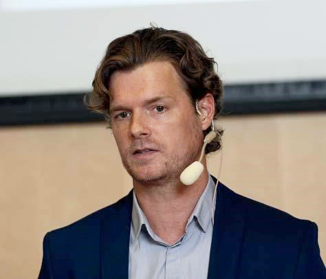 Frank Steinicke bei einem Vortrag zur Mensch-Technik-Interaktion